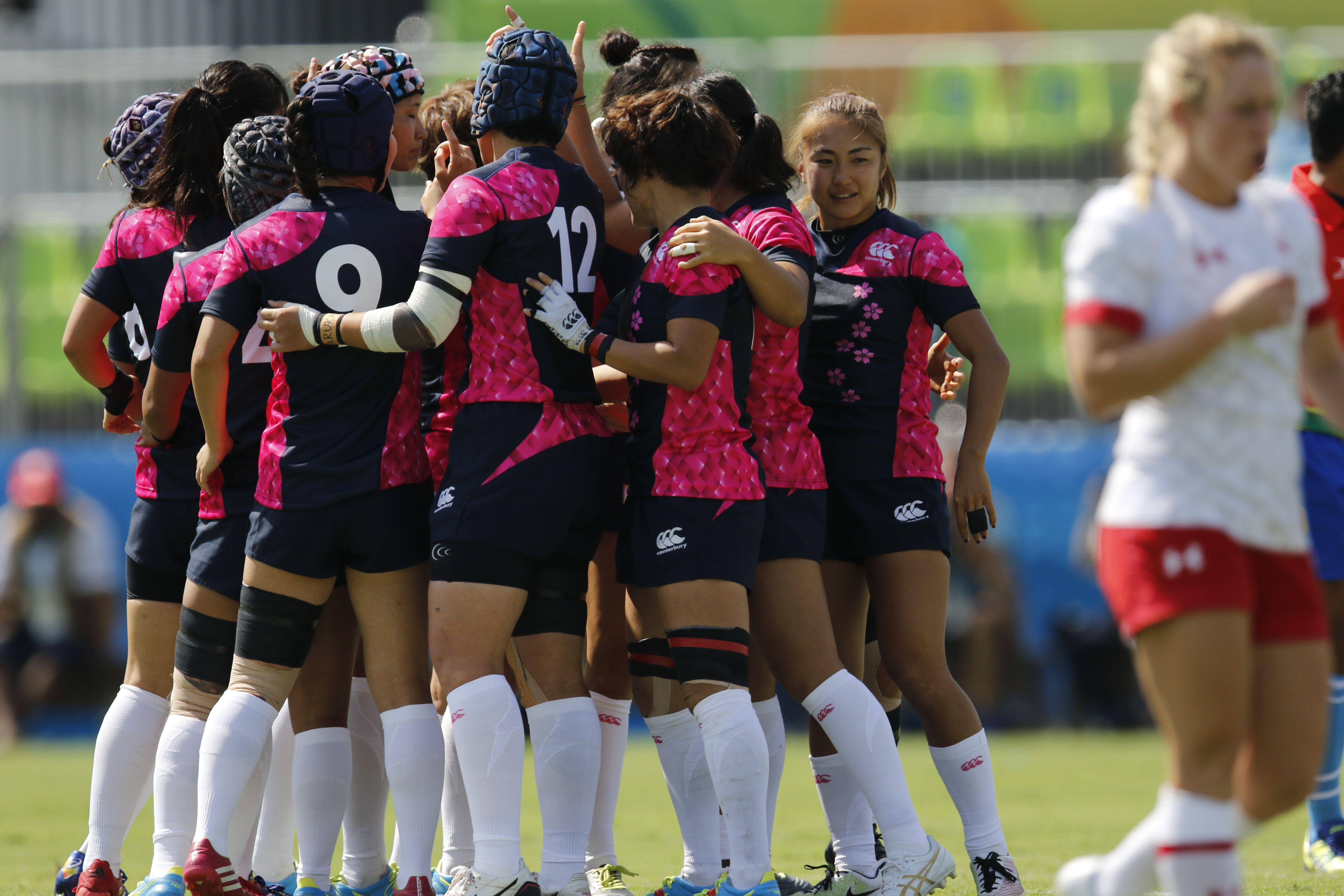 Rugby feminino: Canadá vence Japão por 45 a 0